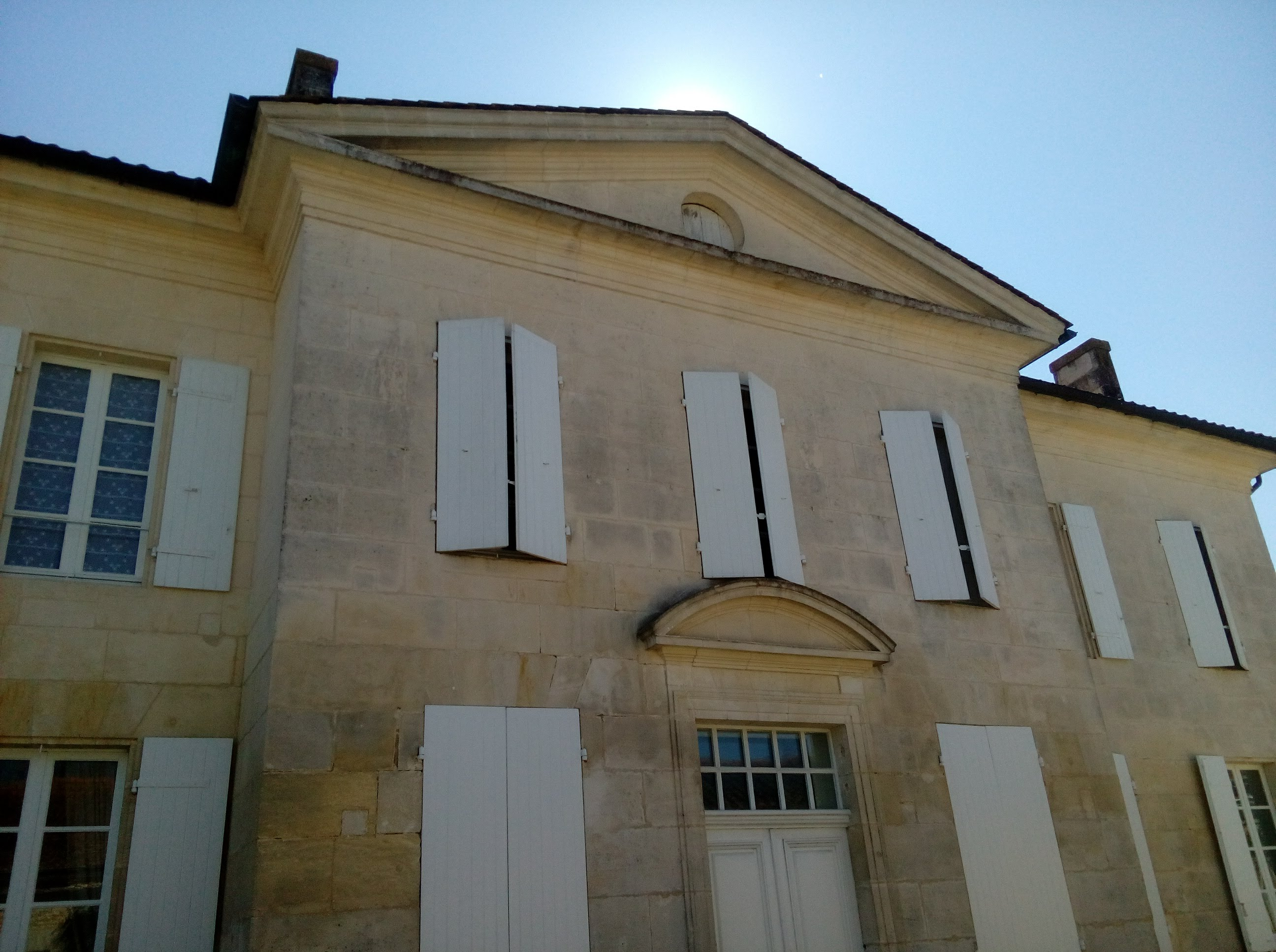 Façade nord, logis de Mont Jourdain, Chassors, Charente, France